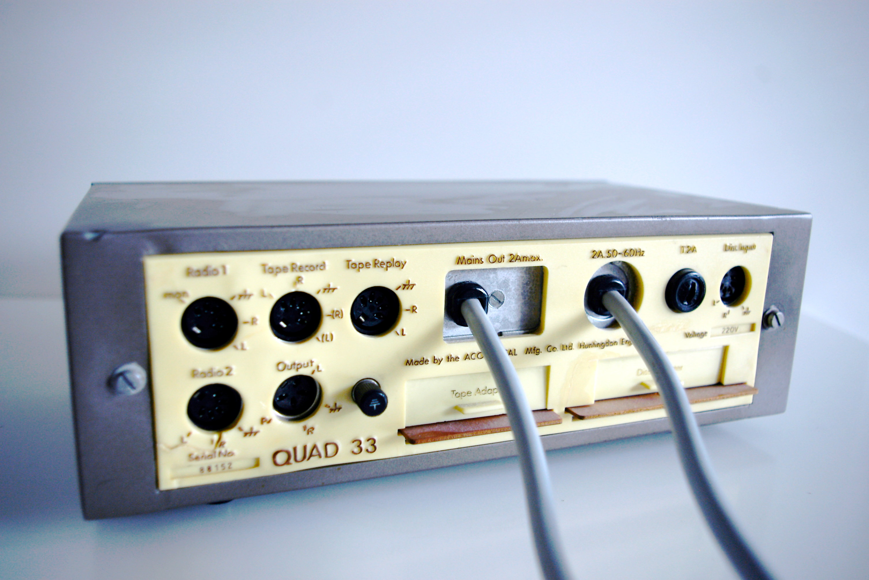 Vorstufe Quad 33, Rückansicht, Autor: Greatarti